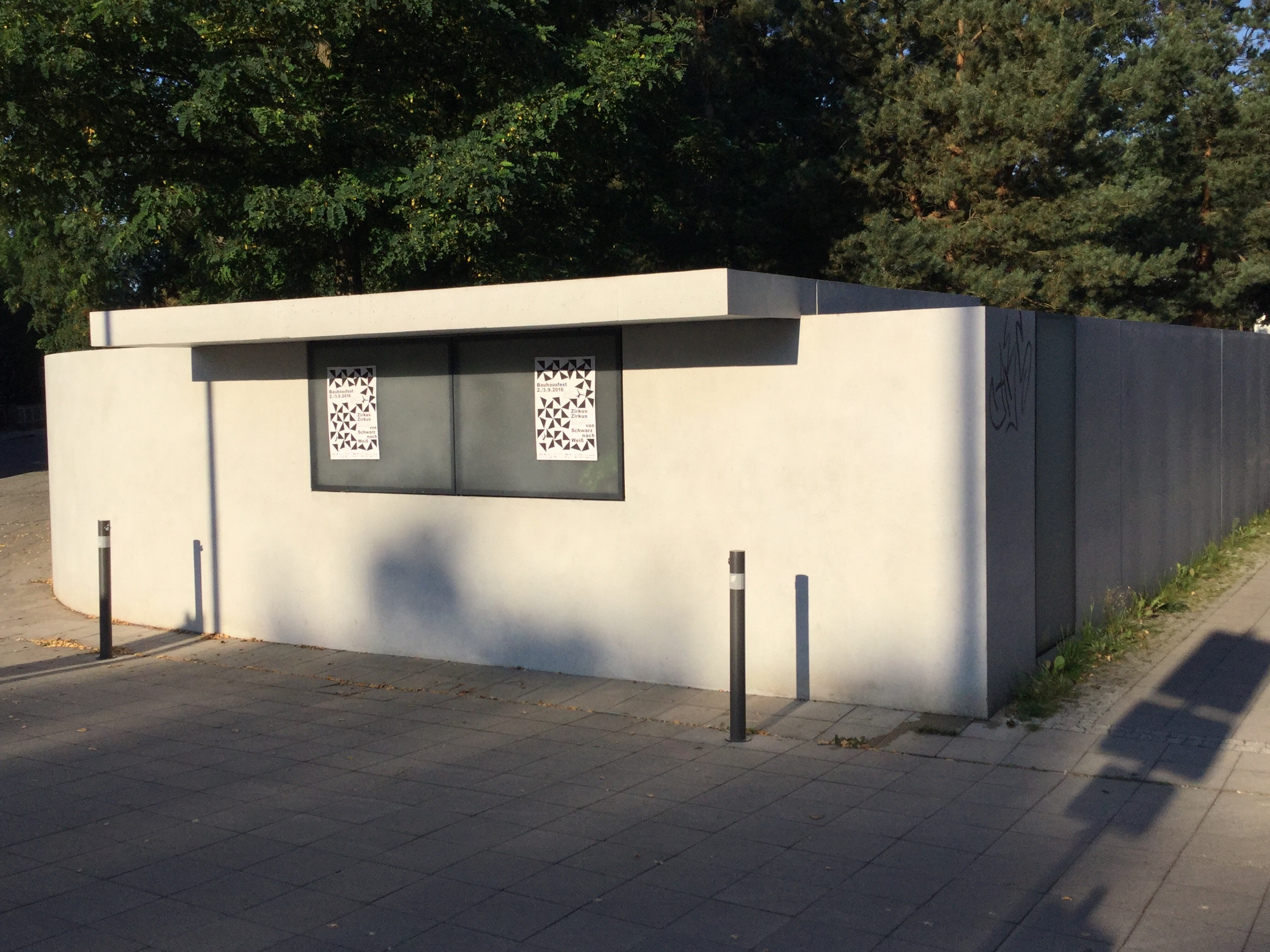 Trinkhalle Dessau